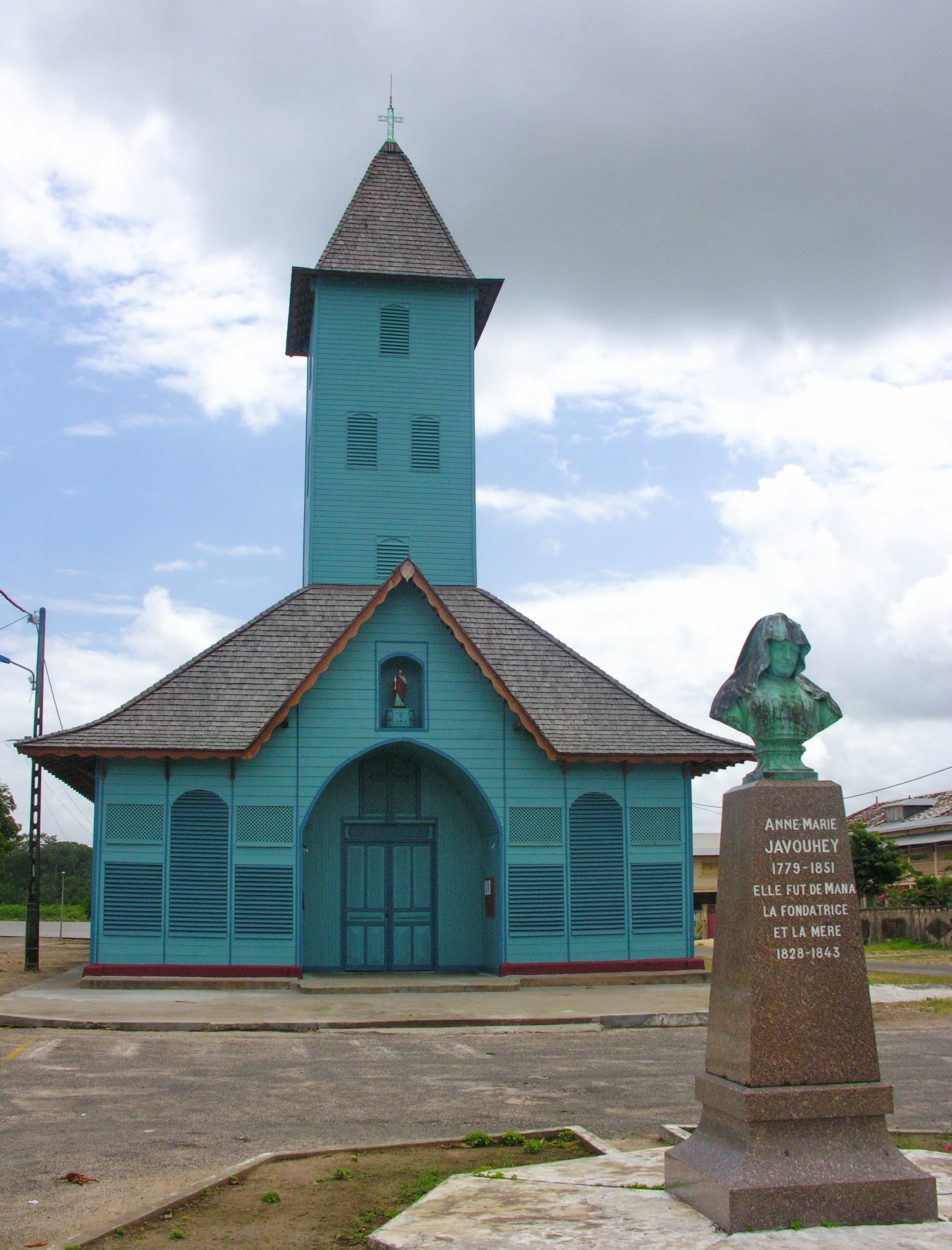 Église Saint-Joseph de Mana (Classé, 1987, 1989) .